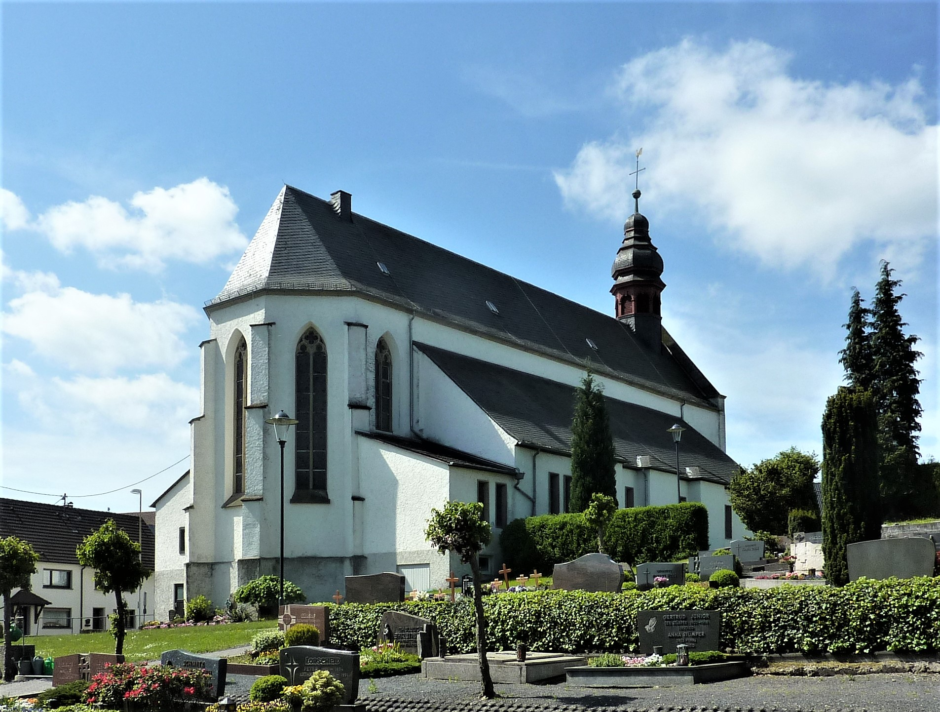 St. Katharina (St. Katharinen-Hilkerscheid)